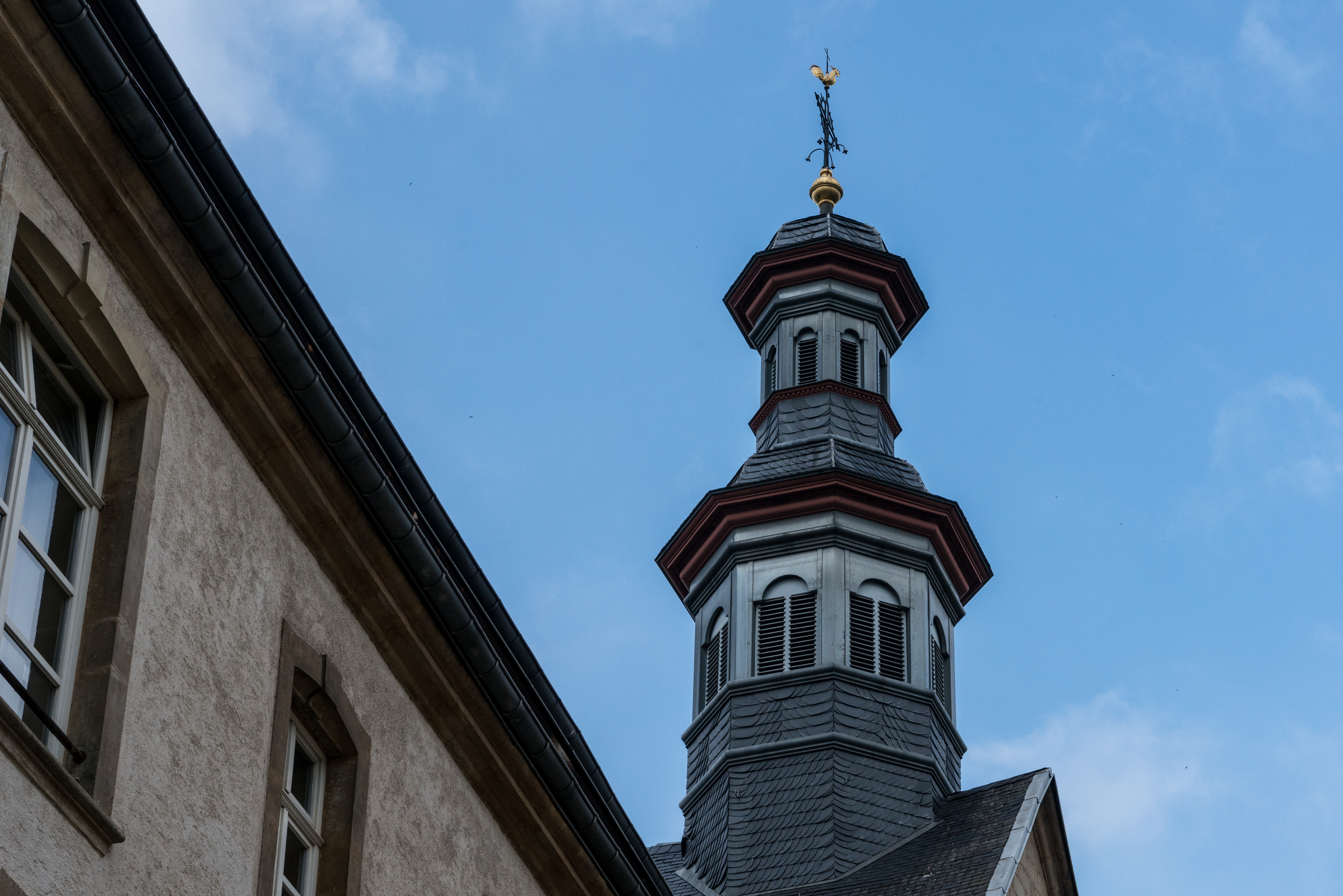 Den Tuerm vun der «Kongregatiounskierch».